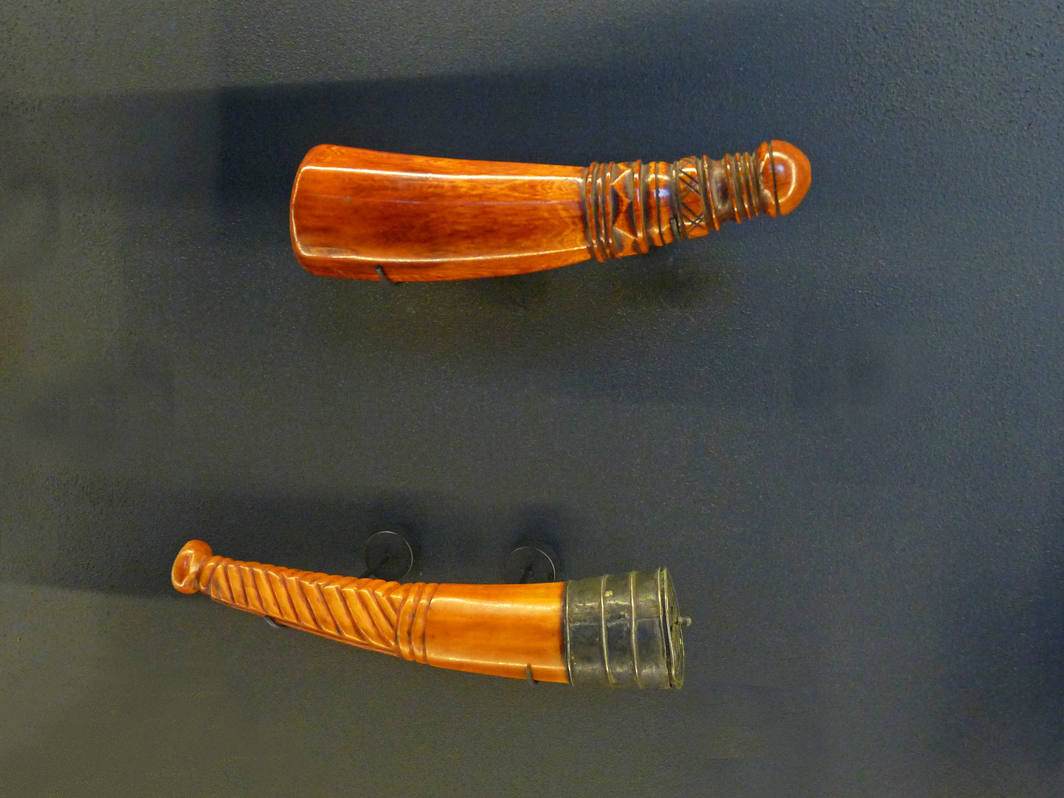 Tabatières, population Toma [ou Loma], Guinée, région de Macenta, ivoire et argent, 19e siècle. Musée du quai Branly.